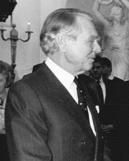 Title: Bonn, Besuch Volkskammer-Delegation, Sindermann People in the image: Beitz, Berthold: Präsident der Krupp-Stiftung, Aufsichtsratsvorsitzender Krupp GmbH, Bundesrepublik Deutschland (GND 118842056) * Sindermann, Horst: Volkskammerpräsident, stellvertretender Staatsratsvorsitzender, DDR * Moldt, Ewald: Leiter der Ständigen Vertretung in der Bundesrepublik Deutschland, DDR Factual corrections and alternative descriptions are encouraged separately from the original description. Additionally errors can be reported at this page to inform the Bundesarchiv. Original historic description: ADN-ZB/Koard-26.2.1986 BRD: Besuch VK-Delegation Der Präsident der Volkskammer der DDR, Stellvertreter des Vorsitzenden des Staatsrates und Mitglied des Politbüros des ZK der SED, Horst Sindermann, hielt sich an der Spitze einer Delegation der Volkskammer der DDR vom 19. - 22.2.86 in der BRD auf. Er folgte damit einer Einladung des Vorsitzenden der Fraktion der SPD im Bundestag, Dr. Hans-Jochen Vogel, die anläßlich eines Besuches einer von Prof. Dr. Horst Ehmke geleiteten Delegation der SPD-Bundestagsfraktion bei der Volkskammer im März 1984 ausgesprochen worden war. UBz: Horst Sindermann (Mitte) im Gespräch mit dem Vorsitzenden des Aufsichtsrates der Friedrich Krupp GmbH, Dr. Berthold Beitz (1.v.l.), auf dem Empfang des Leiters der Ständigen Vertretung der DDR in der BRD, Botschafter Ewald Moldt (1.v.r.).